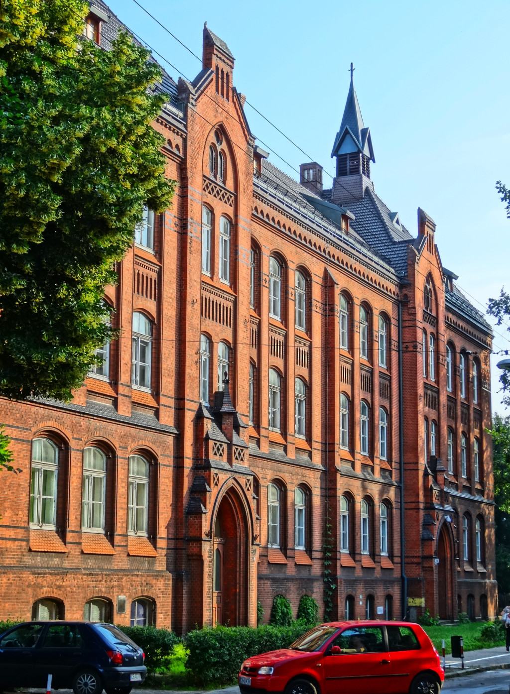 Budynek dawnej szkoły powszechnej (Hippelschule) zbud. 1900-1902, Bydgoszcz, zabytek, ul. Kordeckiego 20, w gestii Uniwersytetu Technologiczno-Przyrodniczego